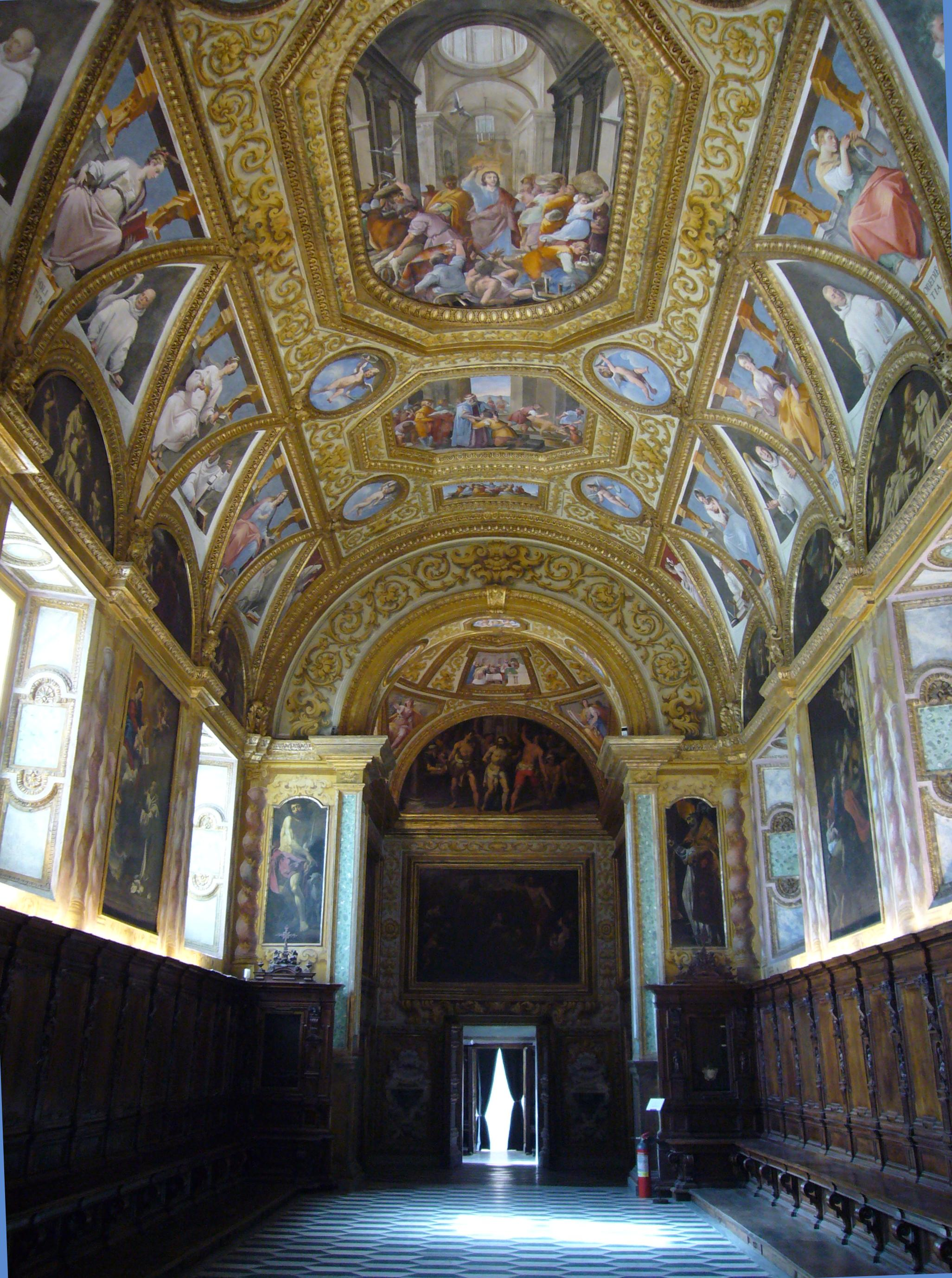 Napoli, Certosa di san Martino: il Parlatorio